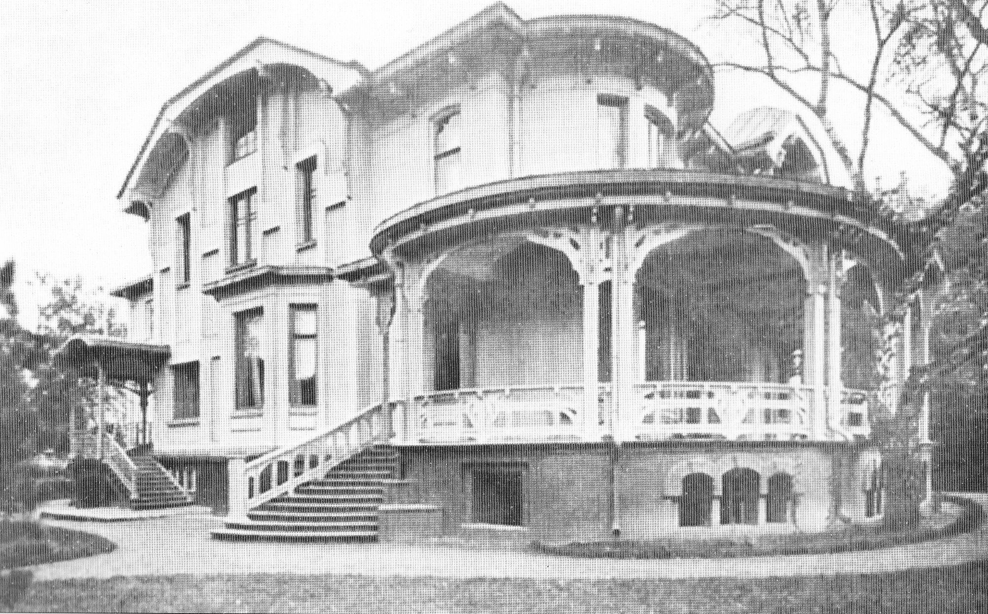 Особняк Носовых на Введенской площади (ныне — Электрозаводская улица, 12). 1903 г.